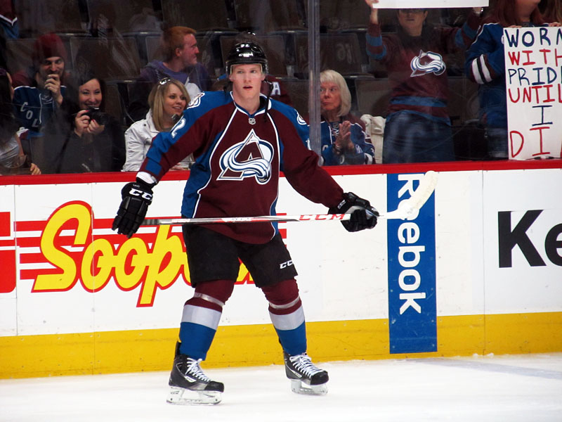 Gabriel Landeskog pregame